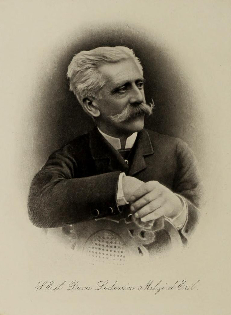 Il Duca Lodovico Melzi d'Eril, ritratto